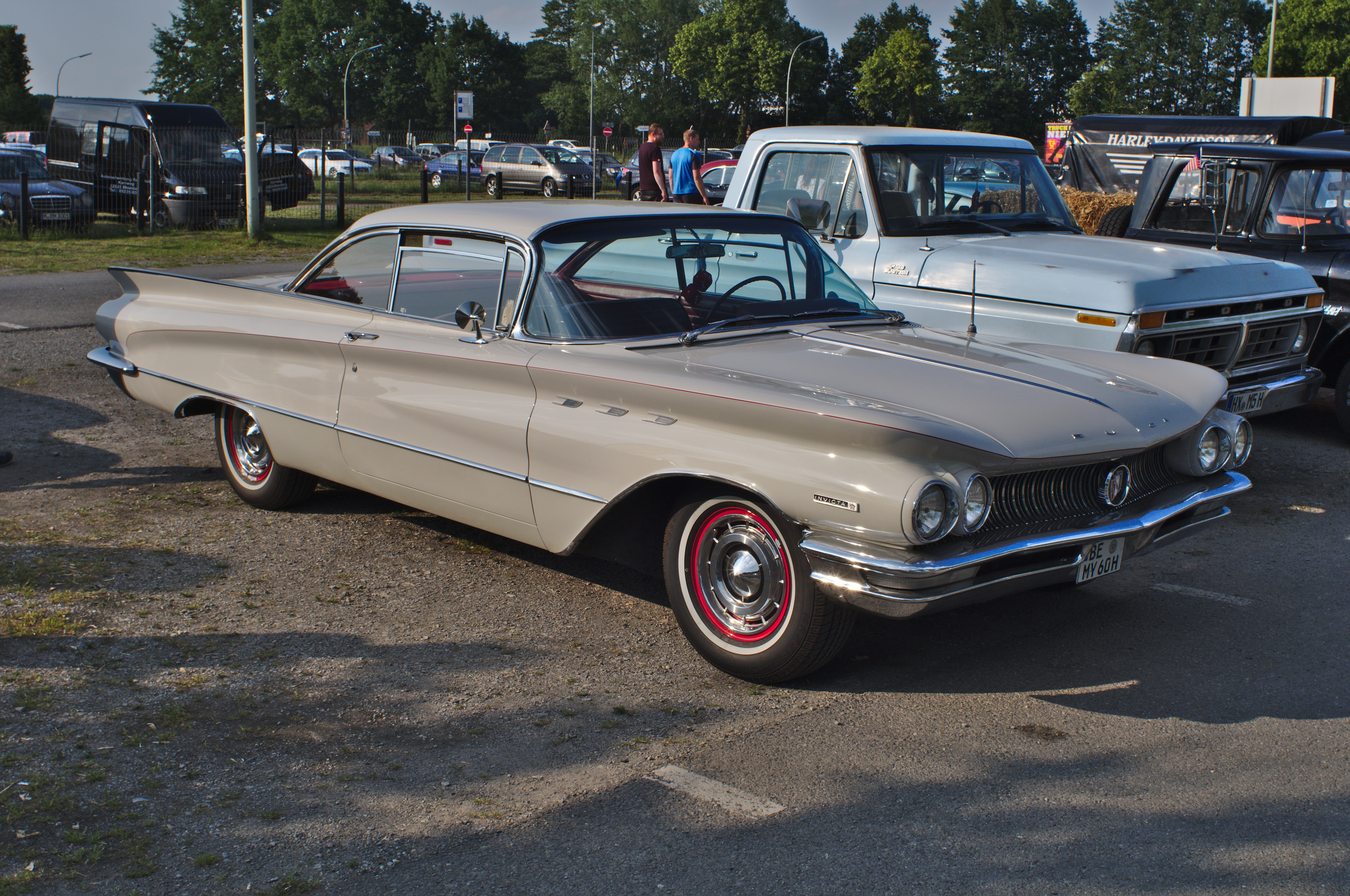 Strassenkreuzer Treffen Kaunitz 2018